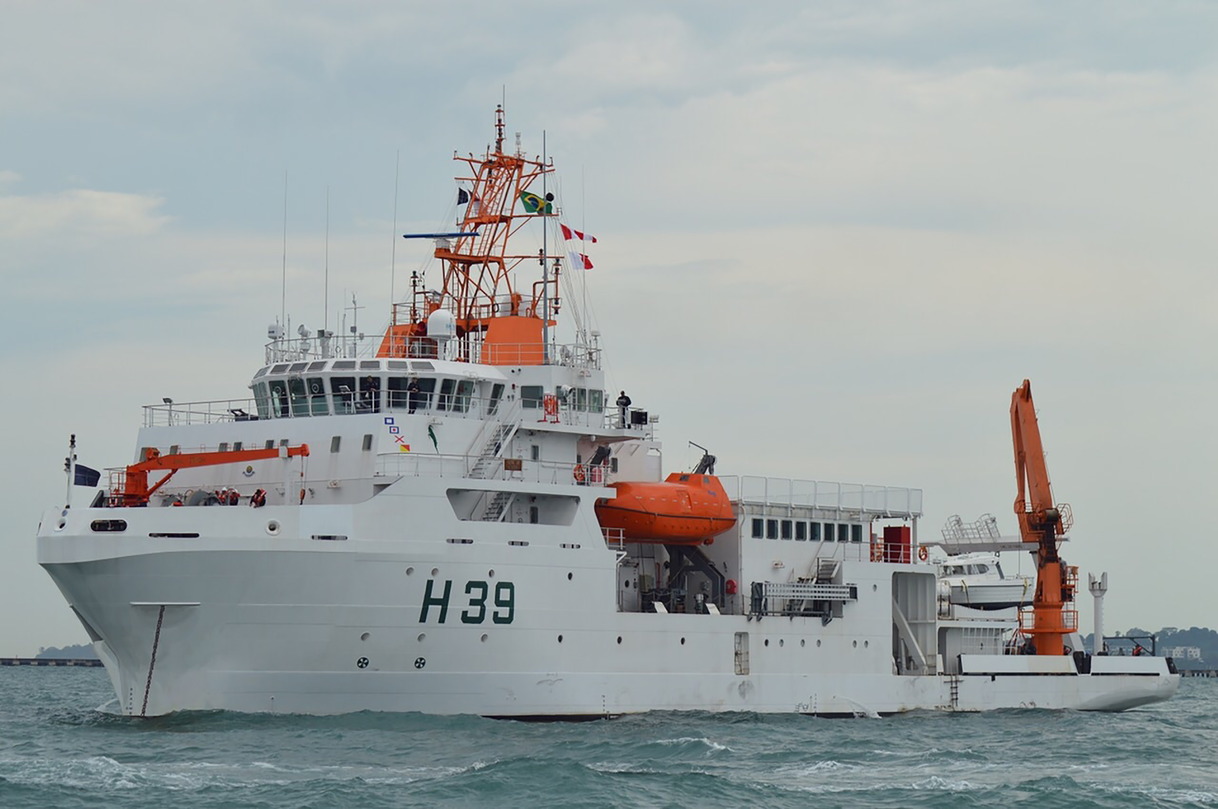 Arquivo liberado pela Marinha do Brasil através de projeto GLAM com Wiki Educação Brasil